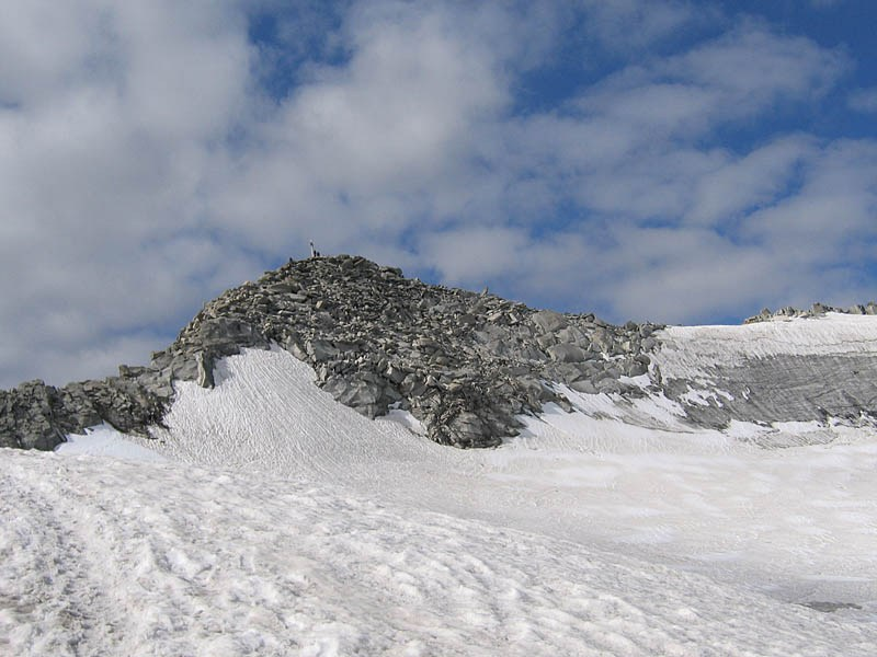 Vista sulla cima del Sasso Nero